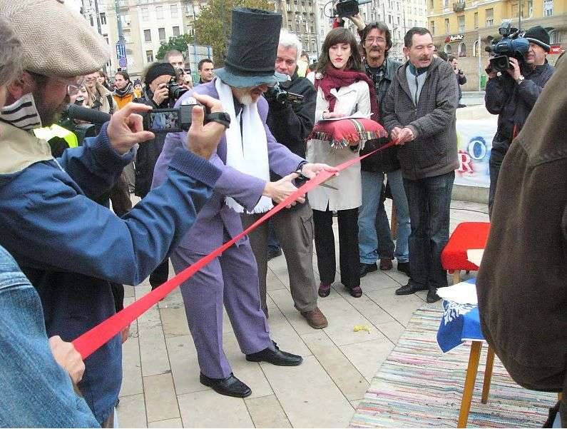 Tiltakozó akció a Móricz Zsigmond körtéren